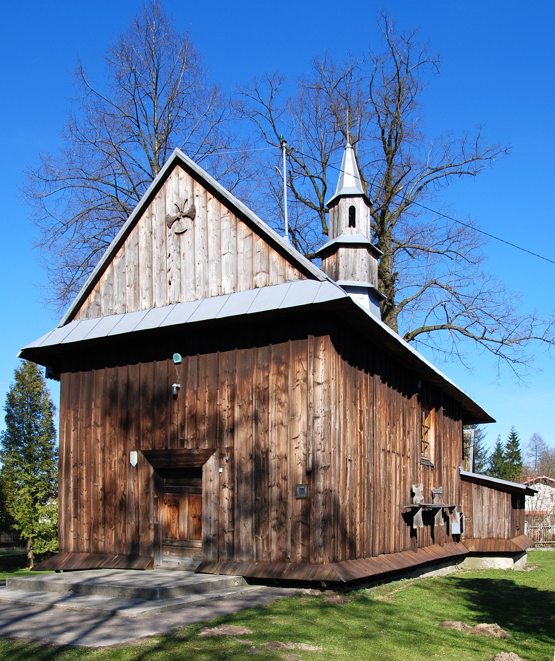 wieś Krzemienna (województwo podkarpackie)